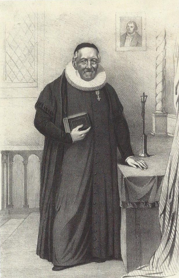 Lithographie von Johann Friedrich Callisen